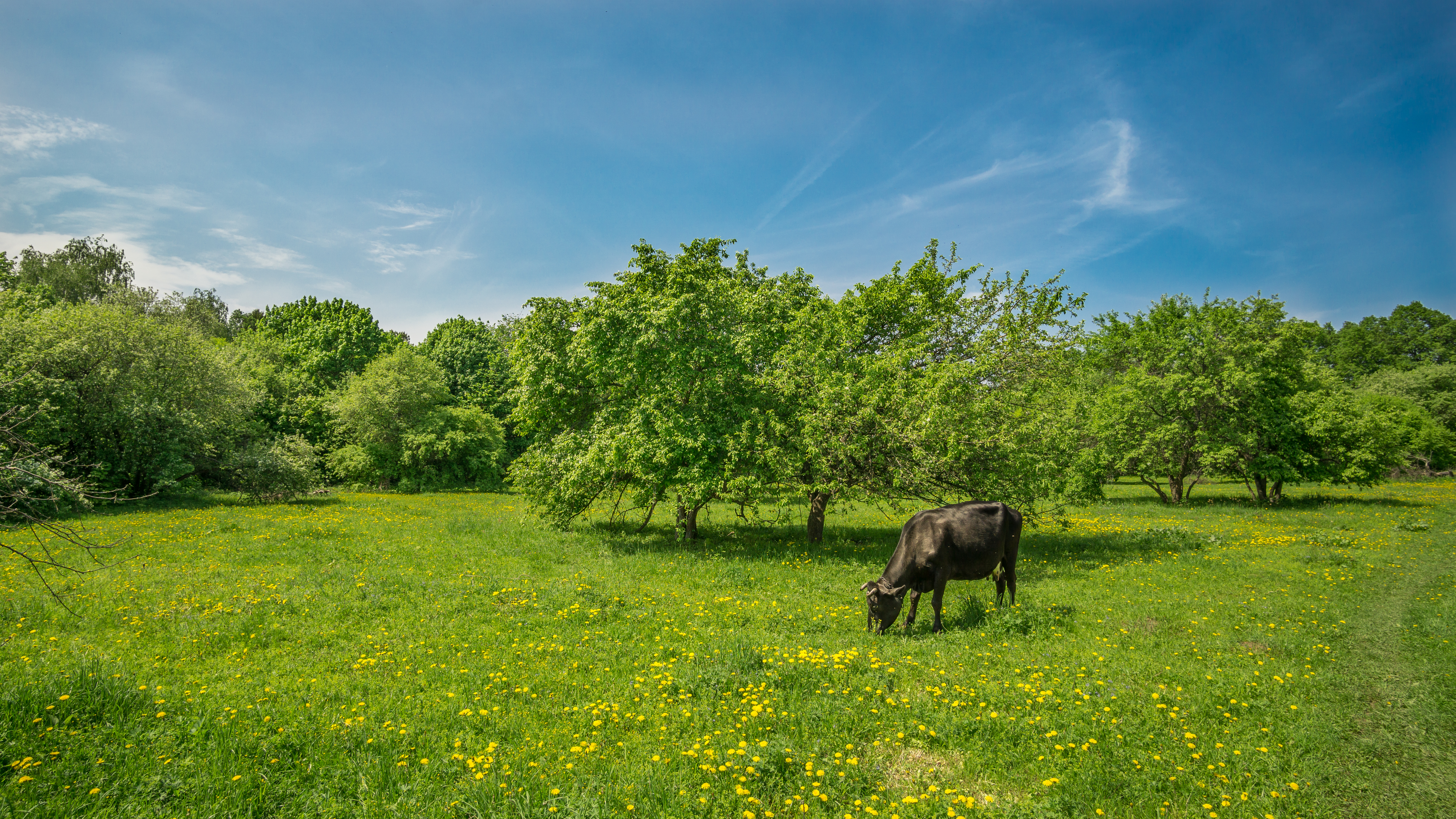 Парк с. Шапкино, Богородский район This image is related to the protected area of Russia number 5210047